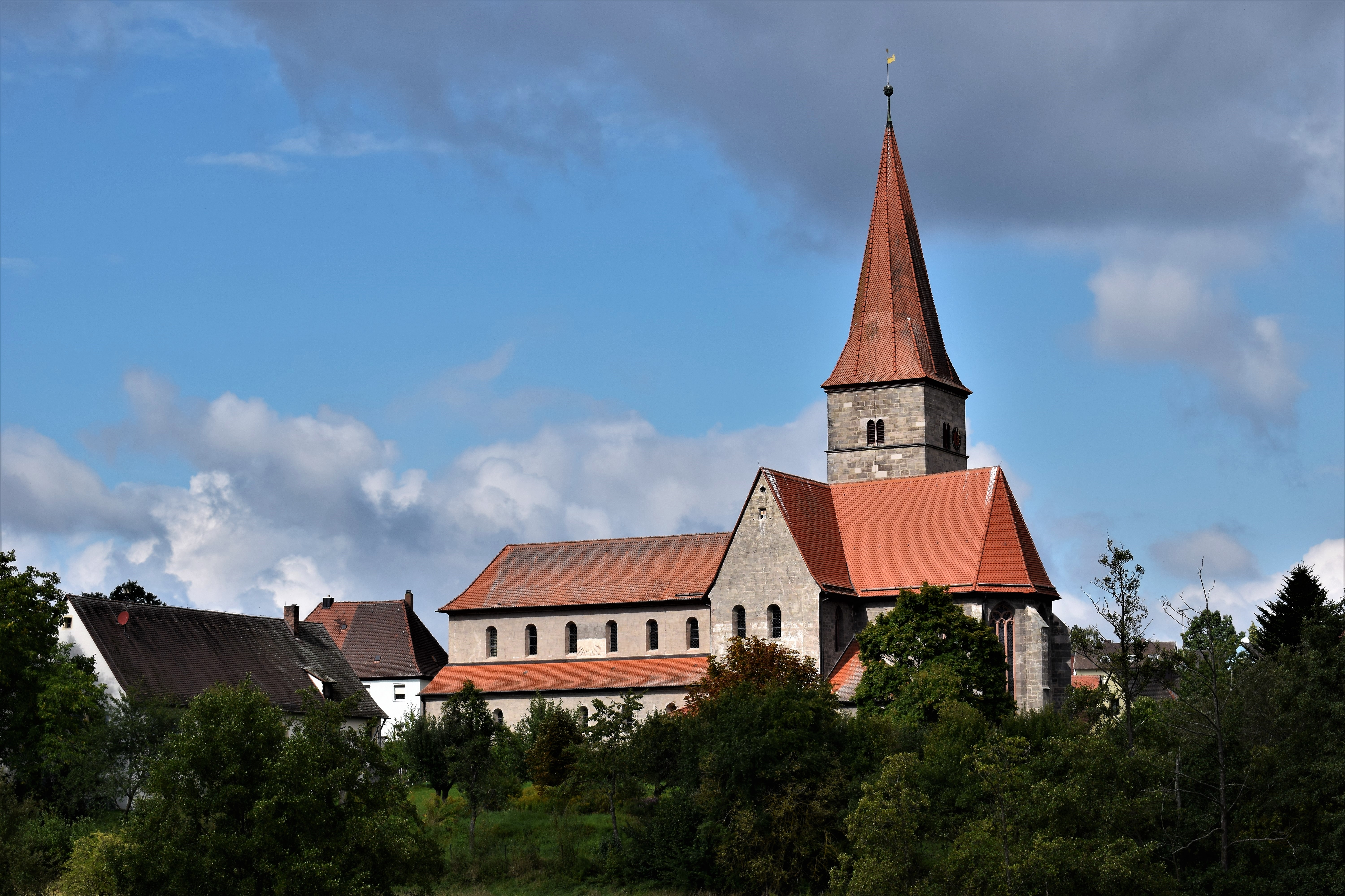 Klosterkirche Münchaurach (2017)